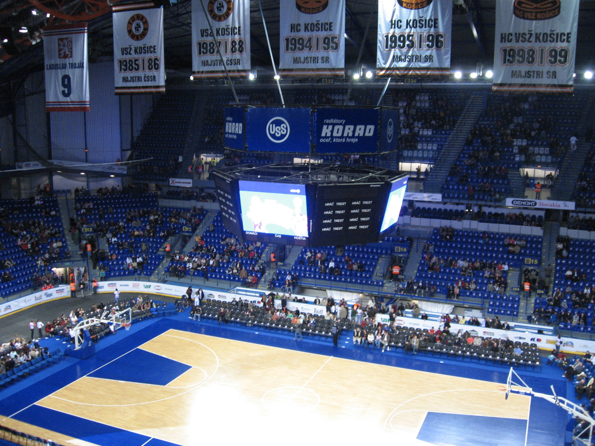 Steel Aréna Košice, 26. február 2008, príprava plochy zimného štadiónu na vystúpenie basketbalového tímu Harlem Globetrotters